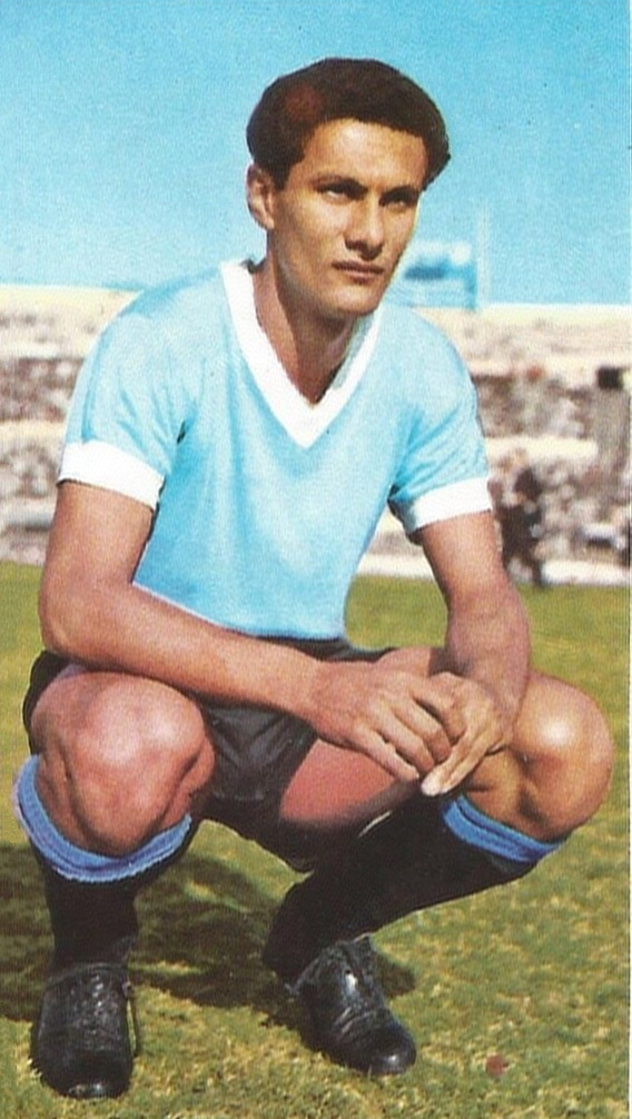 FIGURINA MONDIALI DI CALCIO 1966 ed. epoca - URUGUAY - PEDRO ROCHA